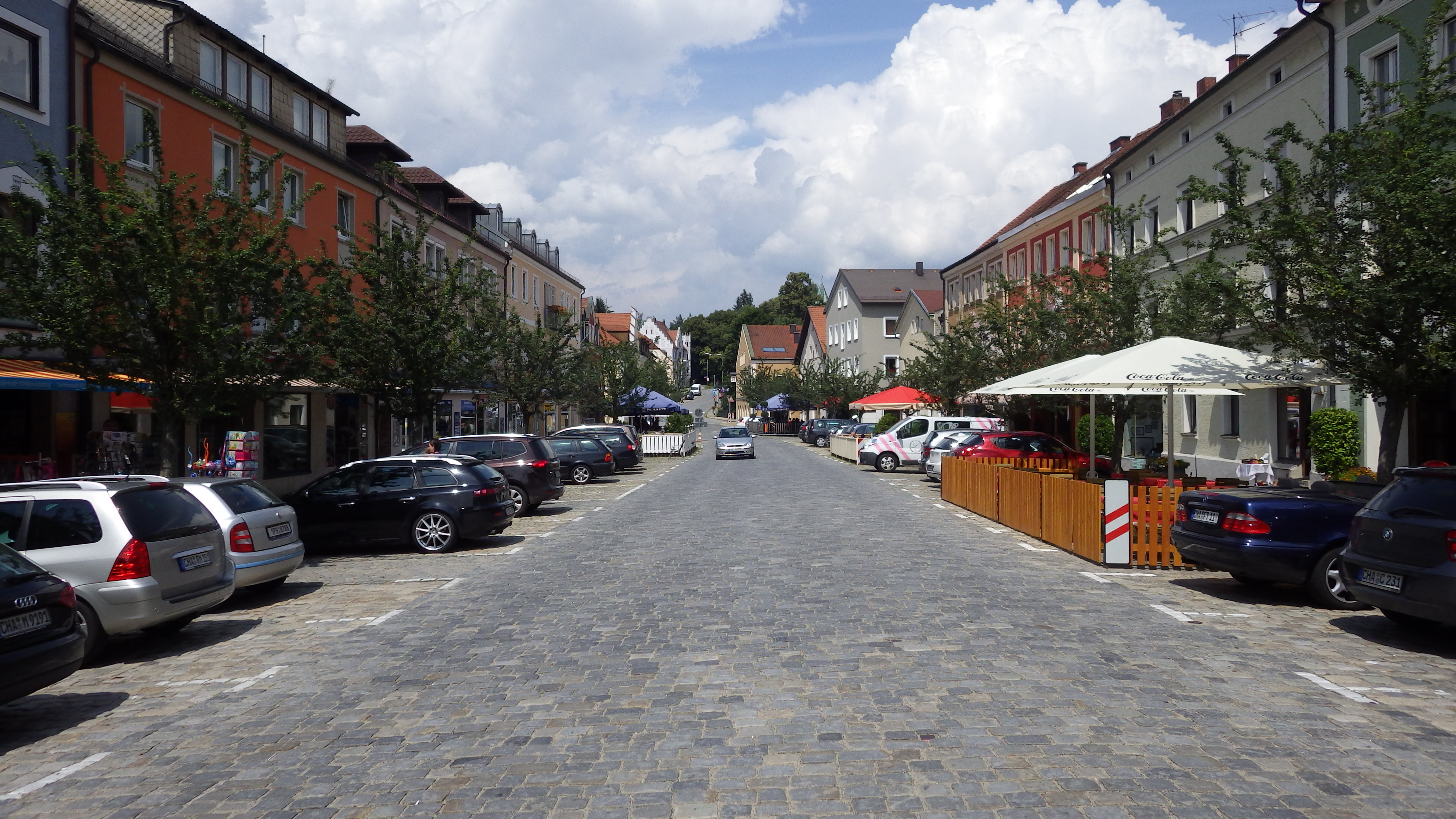 Stadtplatz (Furth im Wald) von Süden